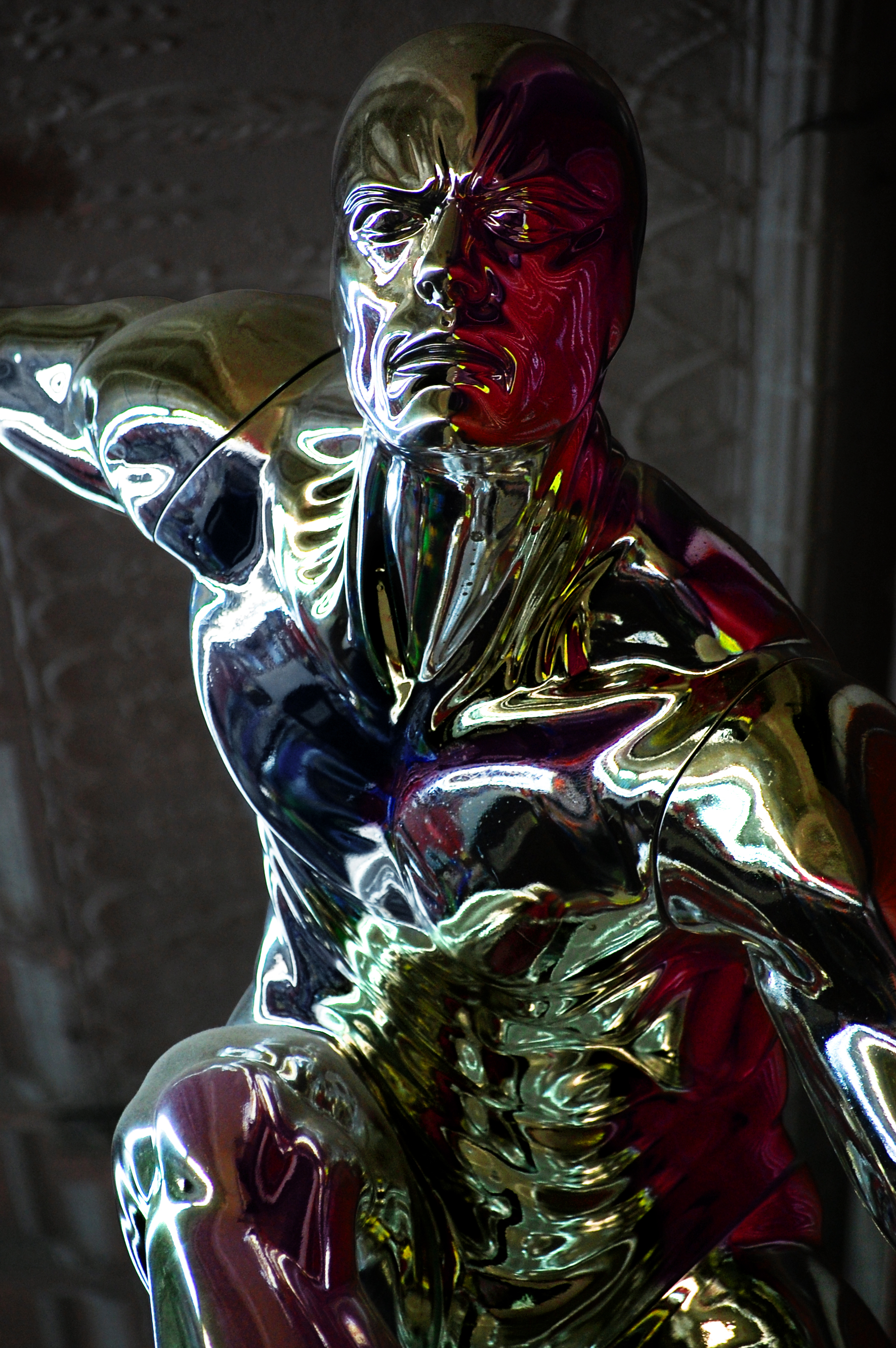 Psychedelic Silver Surfer